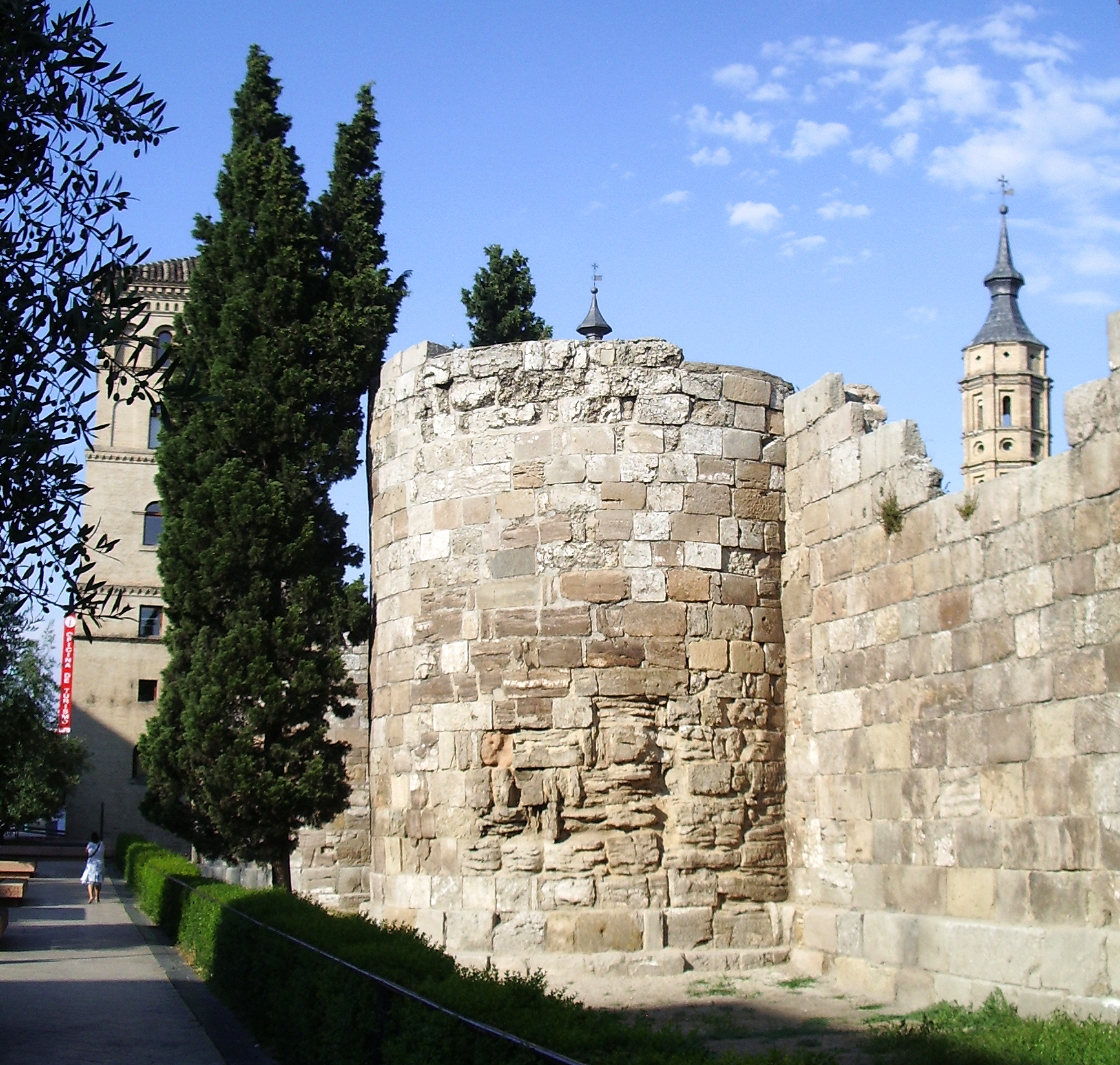 Murallas romanas de Zaragoza